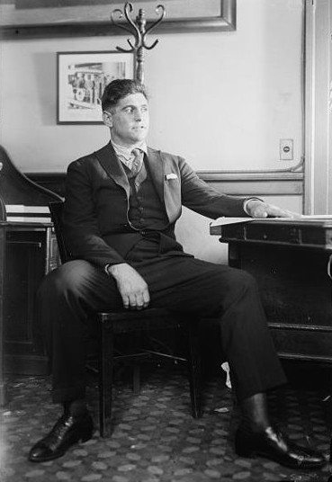 Luis Ángel Firpo, (1894 - 1960), Argentine boxer